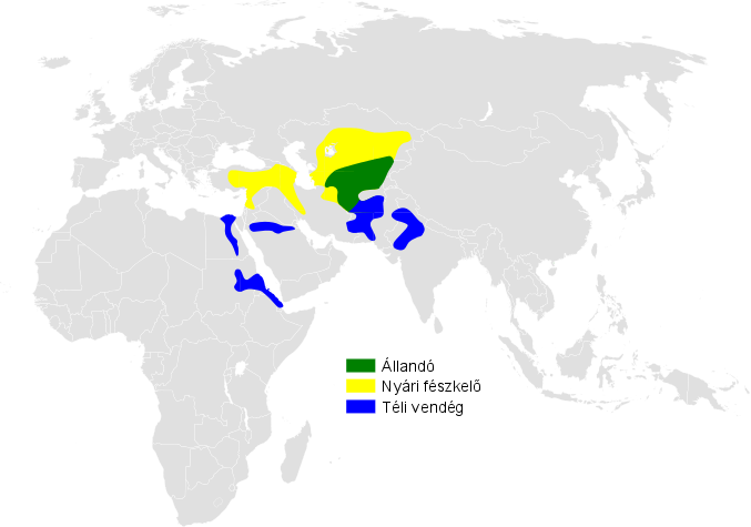 Melanocorypha bimaculata distribution map, based on